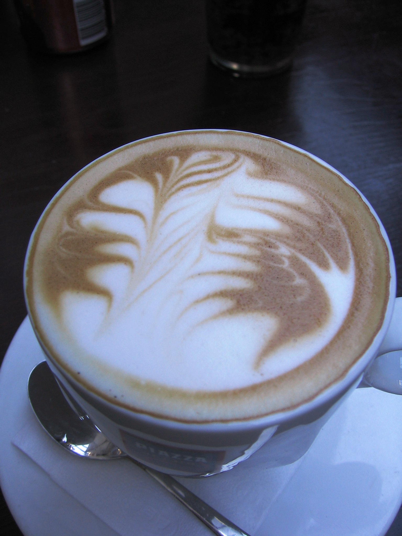 Latte swirl.Latte